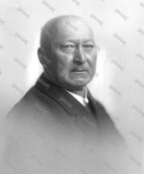 Šimonek Josef (1862-1934), český a československý průmyslník, politik a senátor